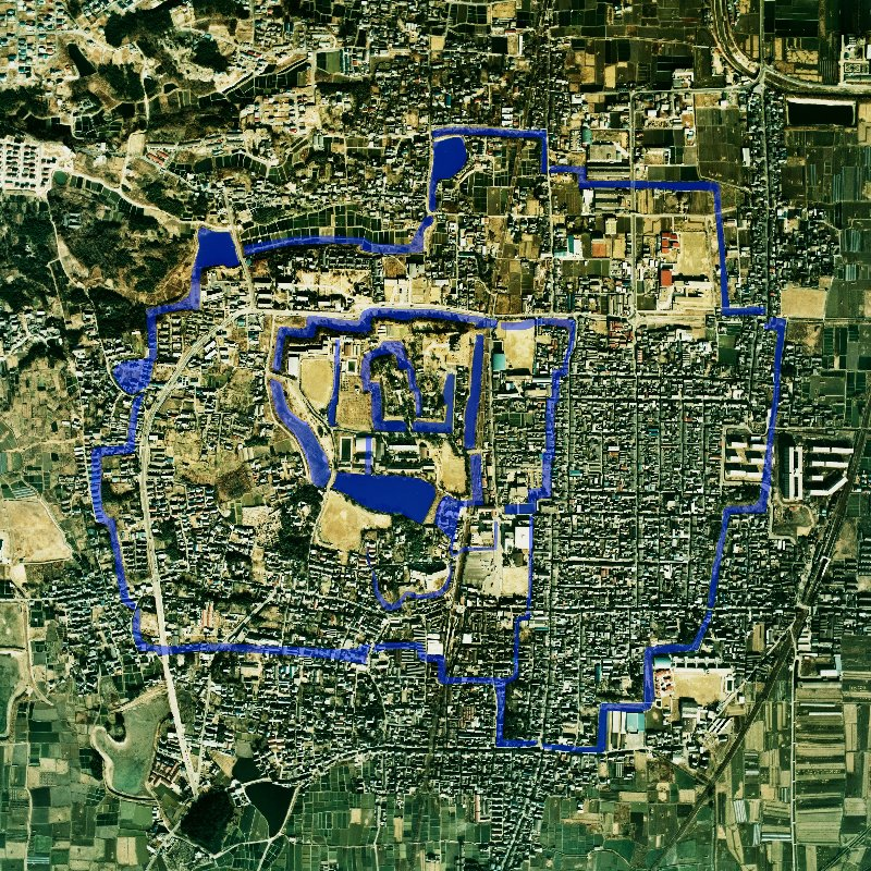 Kooriyama Castle